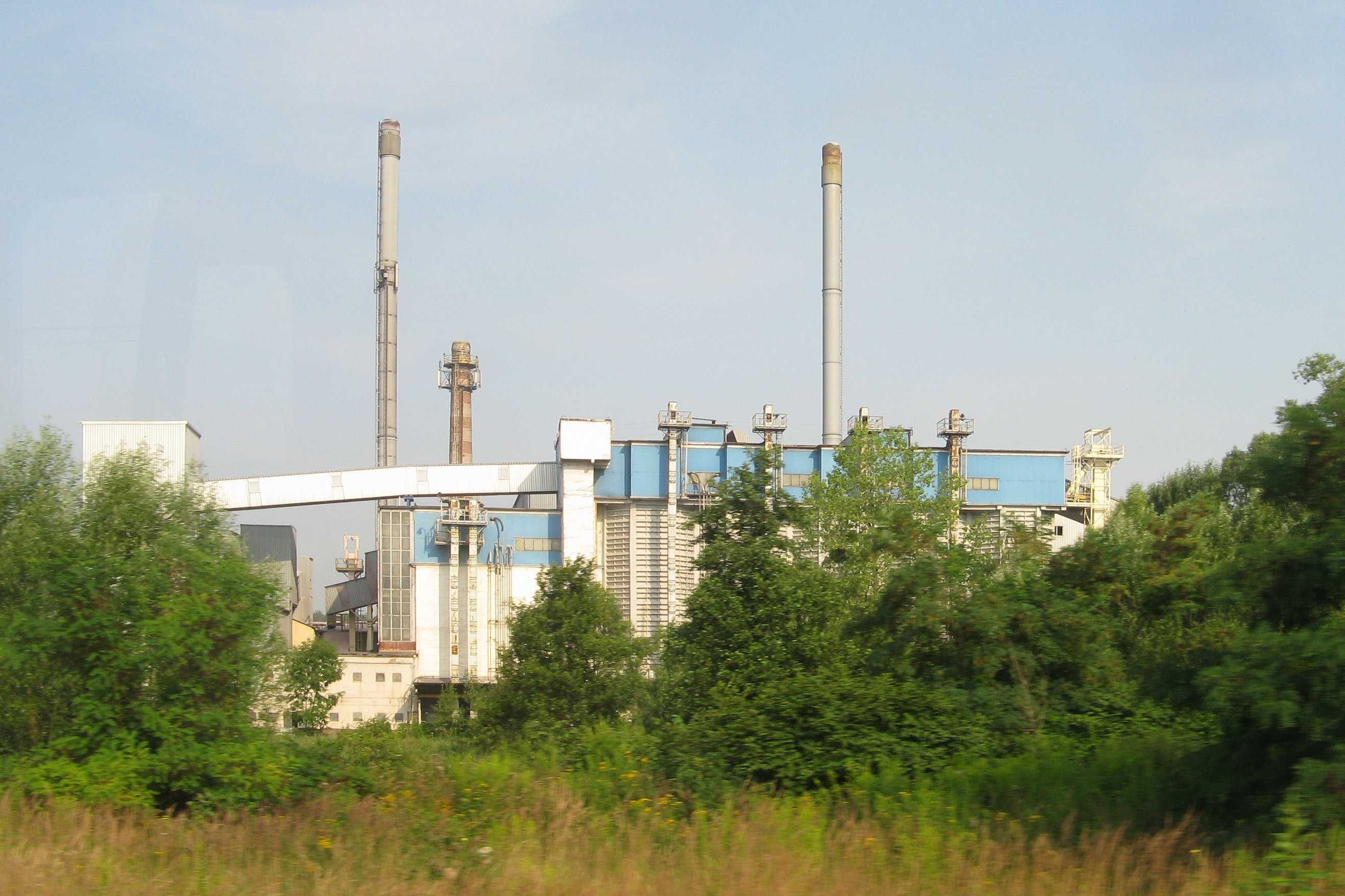 CP Glass S.A. Oddział Huta Szkła „Orzesze” w Orzeszu, widok z pociągu